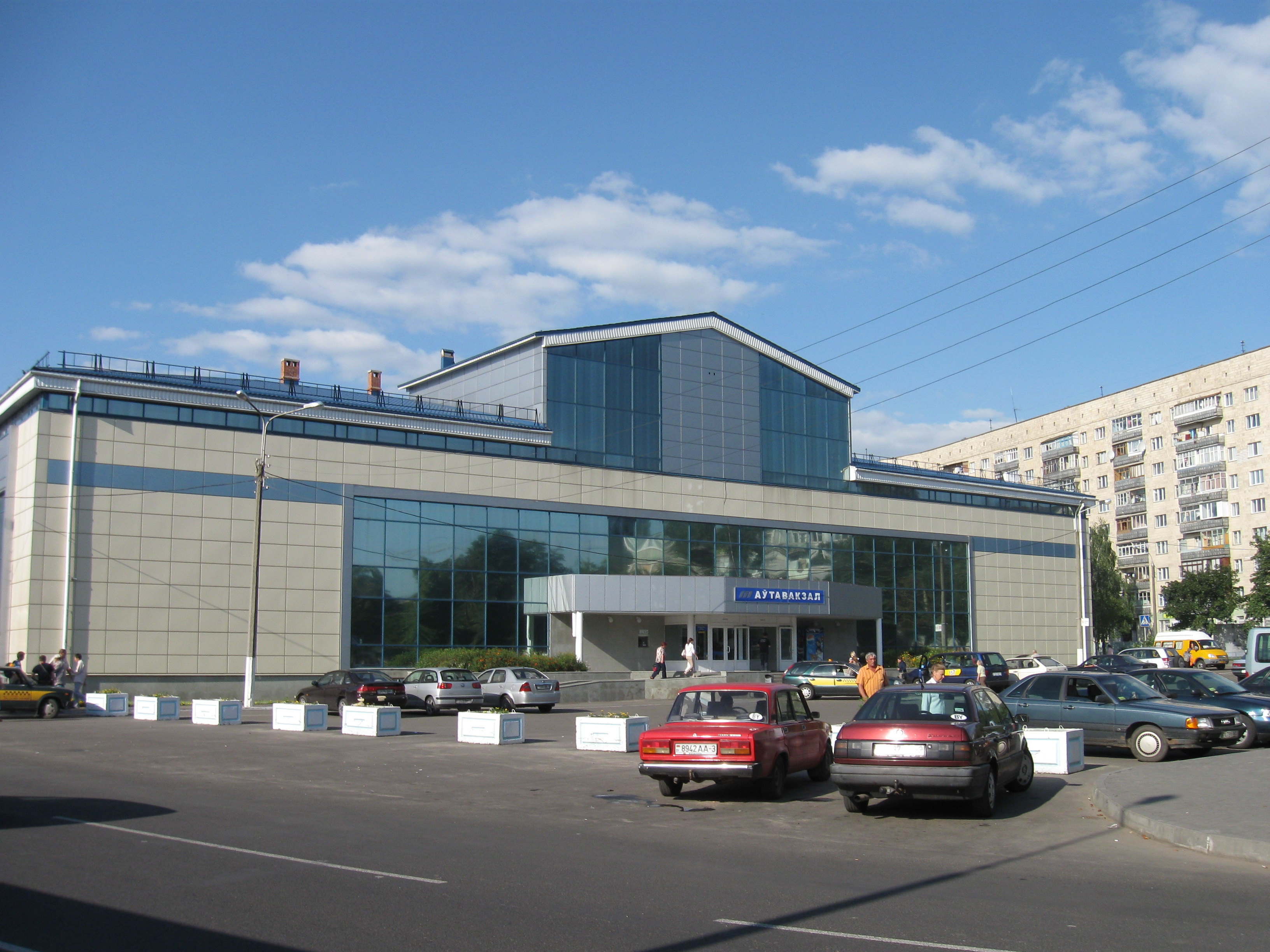 Автовокзал у Гомелі.